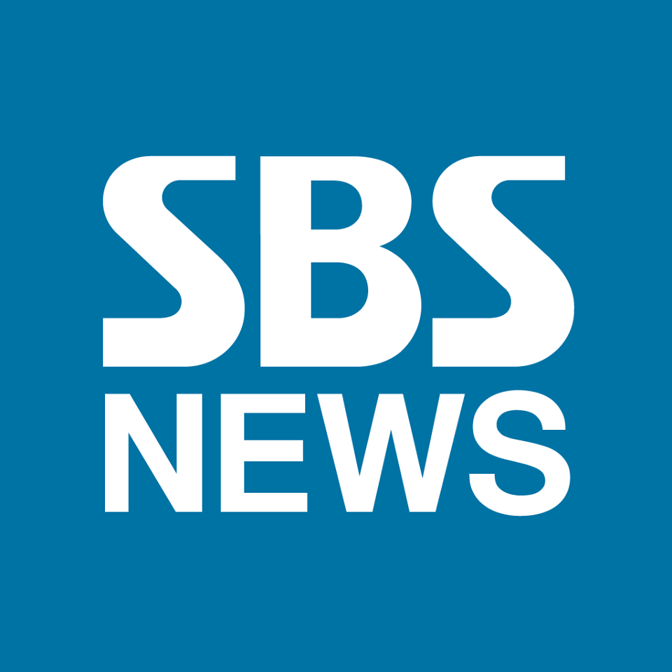 SBS 뉴스 대표 브랜드 로고입니다.